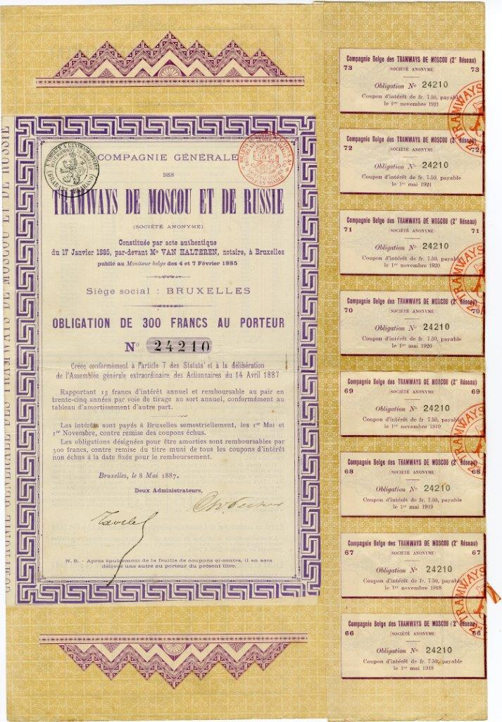 5% облигация в 300 франков на предъявителя акционерного общества "Генеральная компания трамваем Москвы и России". Брюссель, 1887 г.